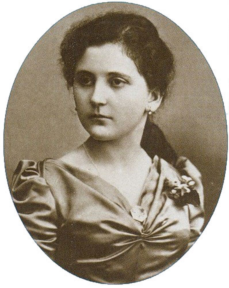 Мария Константиновна Кексгольмская; Дочь Кексгольмского полка (на шейной цепочке — полковой жетон 1885 г.). Фото 1890 г..